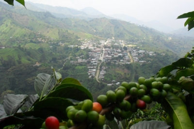 Vista del Centro poblado Herrera desde la vereda Cristales Forografía: Newer Gutierrez Falla